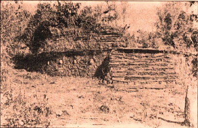 Vista do edifício principal em Gran Pajaten